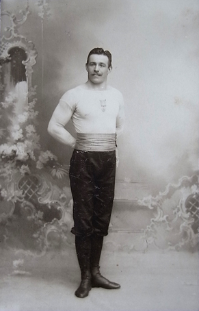 Studiofoto av Axel F. Johansson från cirka 1905.